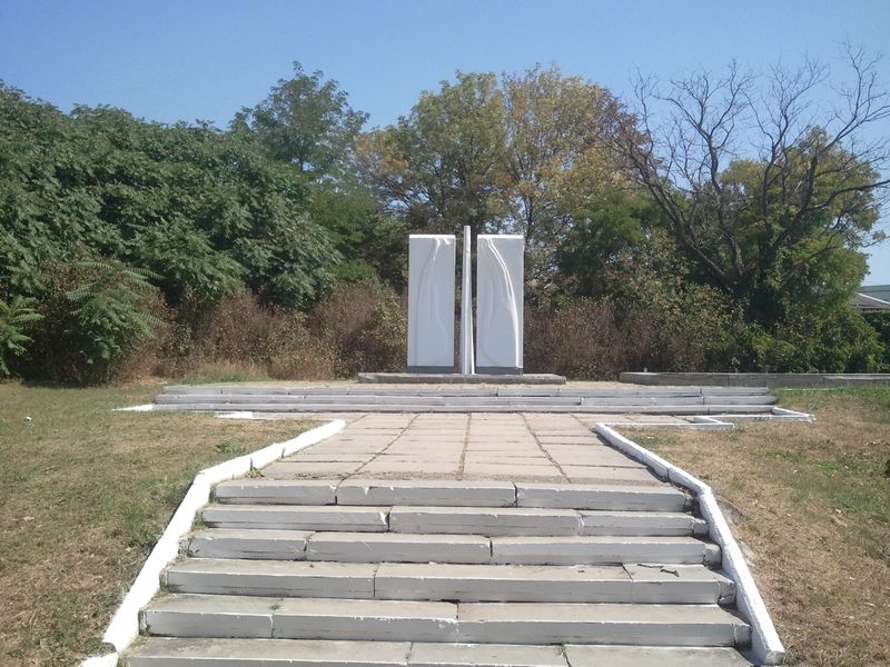 Братская могила умерших в госпиталях сов. воинов, 1944—45, пам. 1963; Братская могила сов. воинов, 1944, пам. 1963; Могила сов. воина, пам. 1960. Титова ул., кладбище